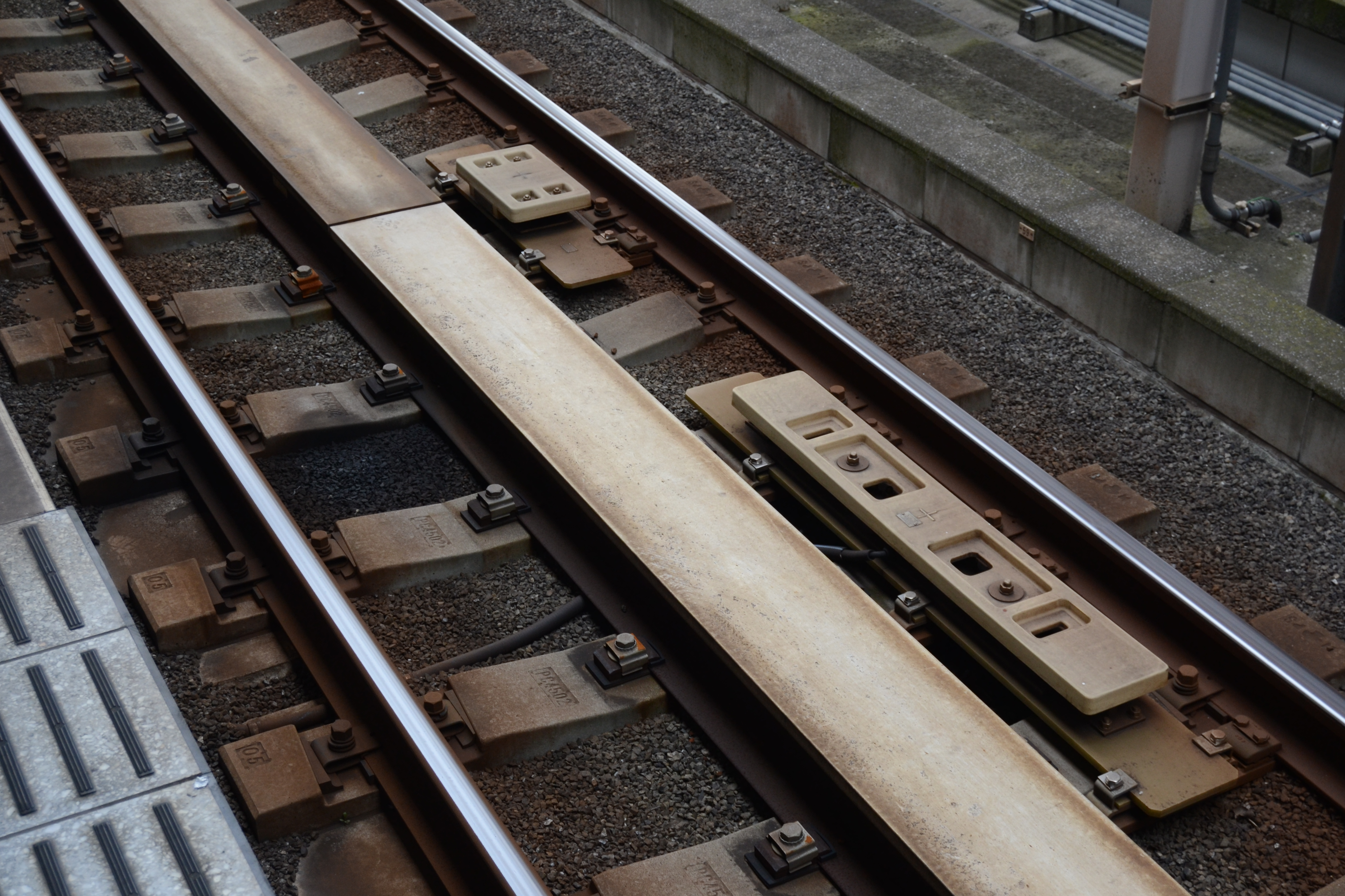 横浜市営地下鉄グリーンラインのレール間に設置された、リアクションプレートとATO地上子